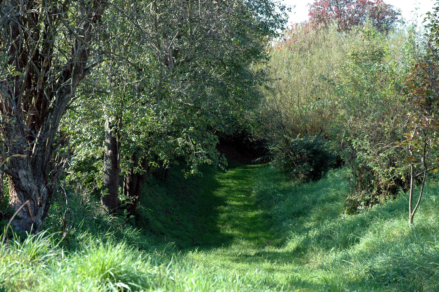 Relikte des Württembergischen Landgrabens in Lauffen am Neckar an der Ilsfelder Str.